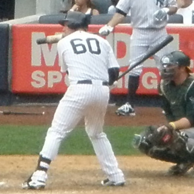 Brandon Laird